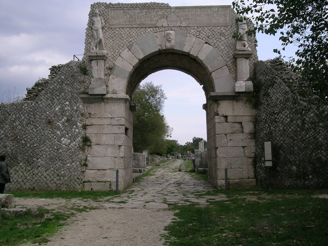 Wikipedia: Sepino. Wikipedia: Saepinum.